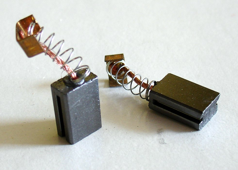 Carbon brushes of small universal electric motor (circular saw). Szczotki węglowe do niewielkiego silnika szeregowego (napędzającego pilarkę).